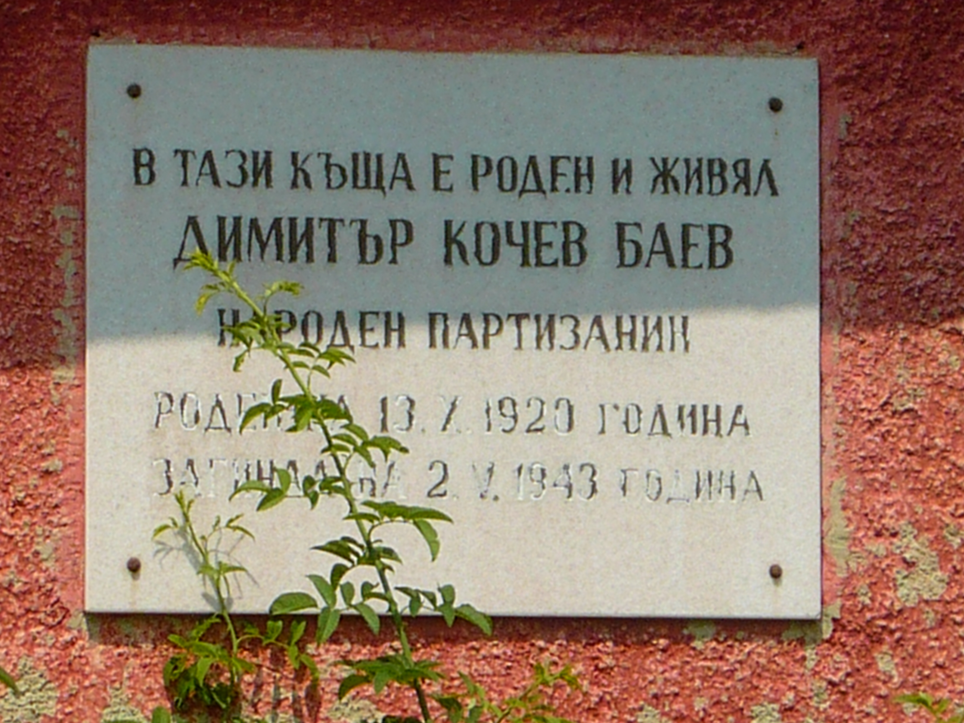 Няма